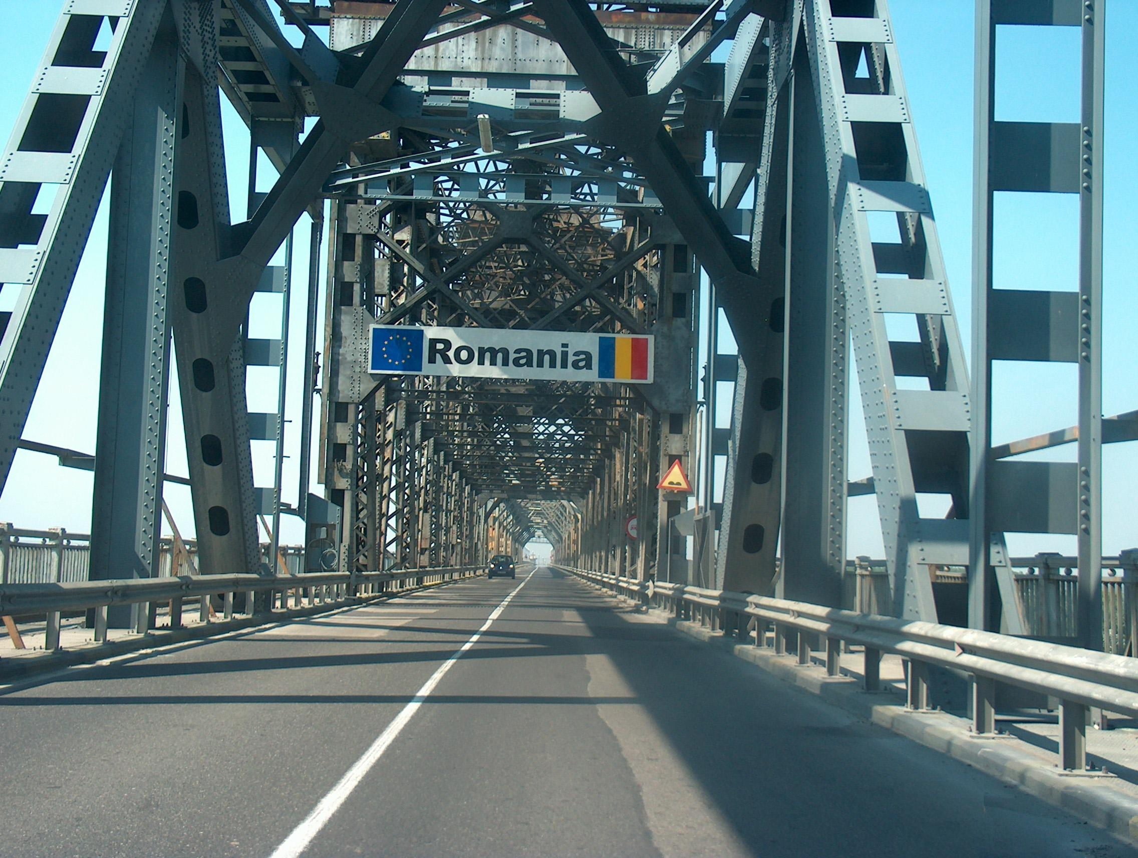 Bulgarisch-Rumänische Grenze in Brückenmitte. "Brücke der Freundschaft" "Мост на дружбата" Vor wenige Jahren standen hier rechts noch Wachposten mit Kalaschnikow